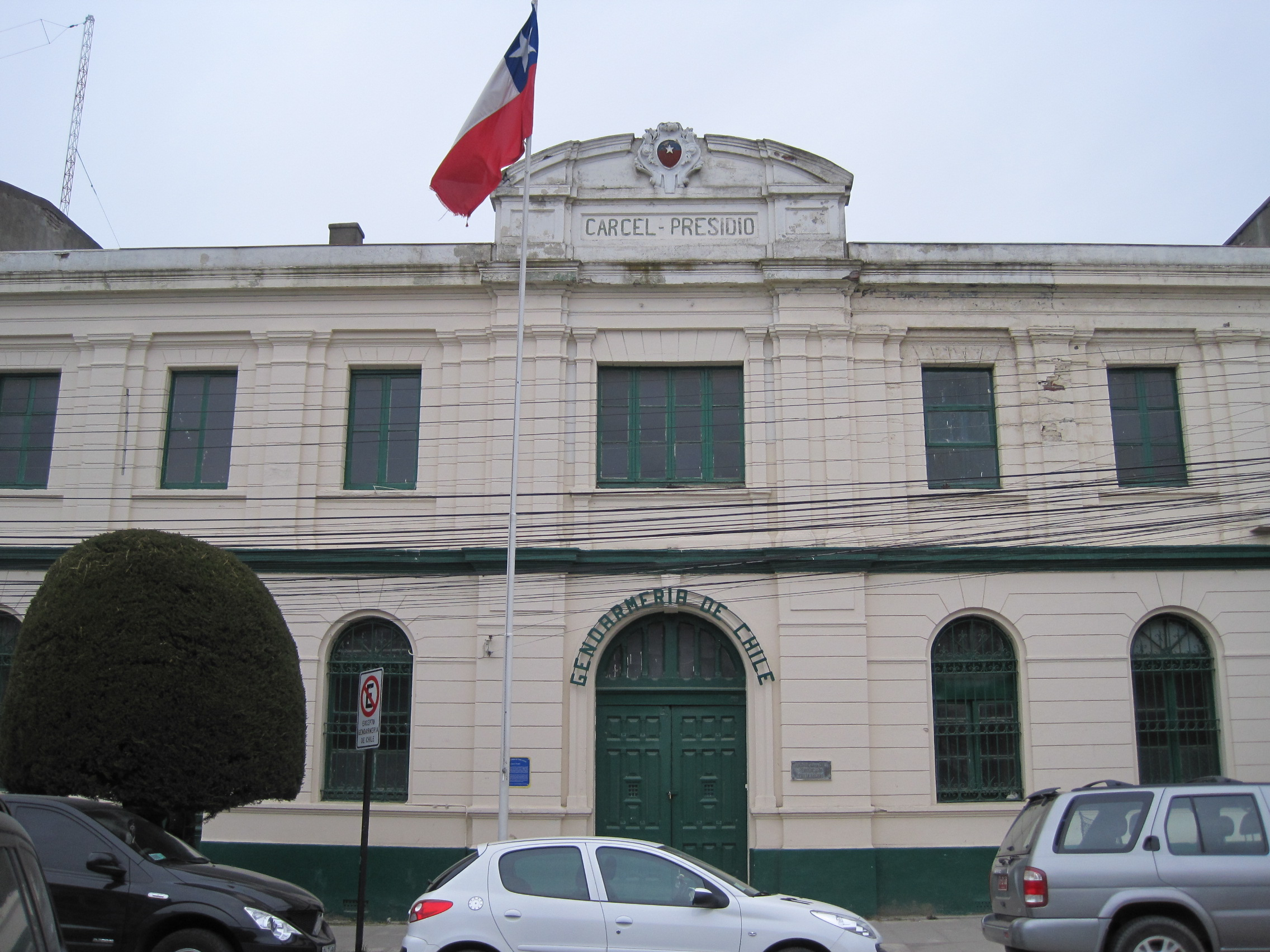 Edificio de gobierno que se utilizaba como cárcel en la ciudad de Punta Arenas, Chile. Actualmente se usa para exhibiciones artísticas. This is a photo of a national monument in Chile: 2139